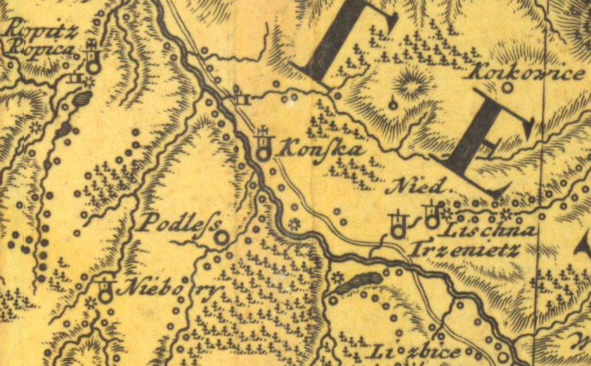 Końska na mapie Księstwa Cieszyńskiego z 1736